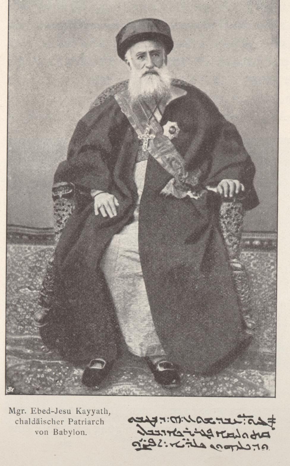 Chaldäisch Kath. Patriarch Abdisho V. Khayat